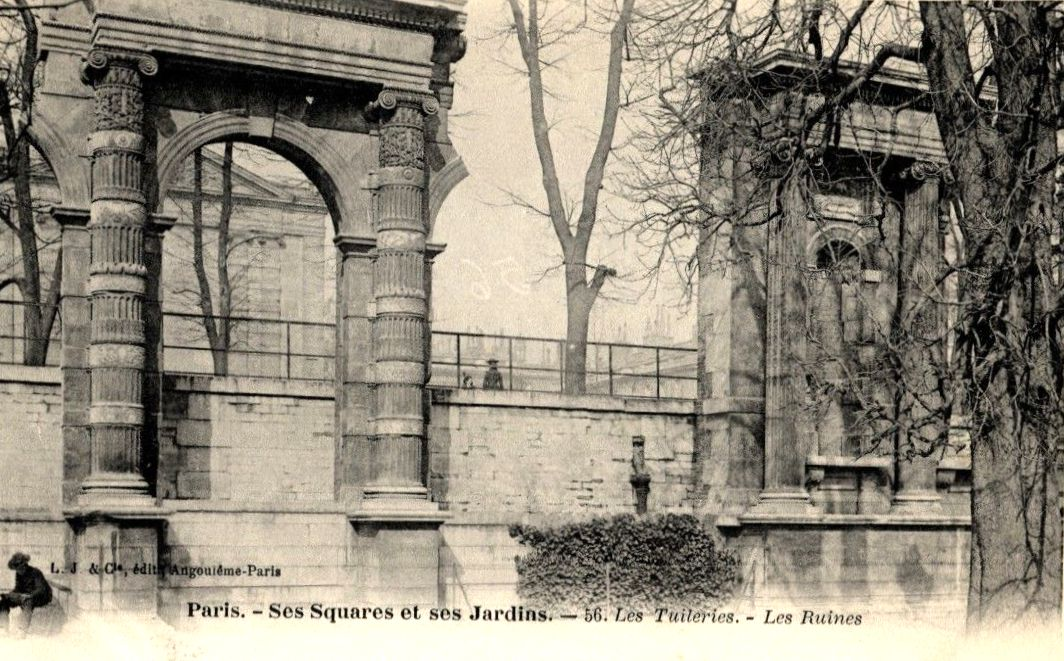 Vestiges du Palais des Tuileries, lorsqu'elles servaient d'élément décoratif au sein du jardin des Tuileries.